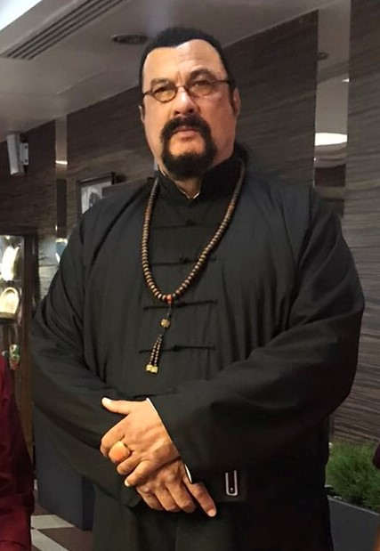 Steven Seagal on a visit to Buryatia, Russia. July 2020